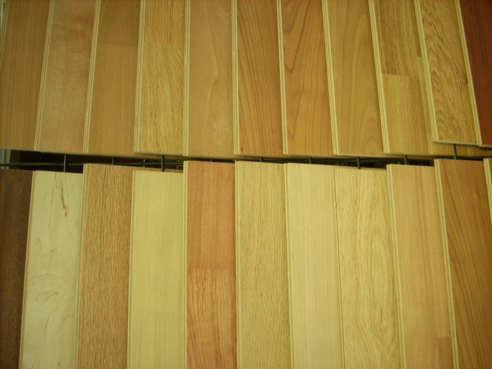 Muestrario de tarima flotante sintética